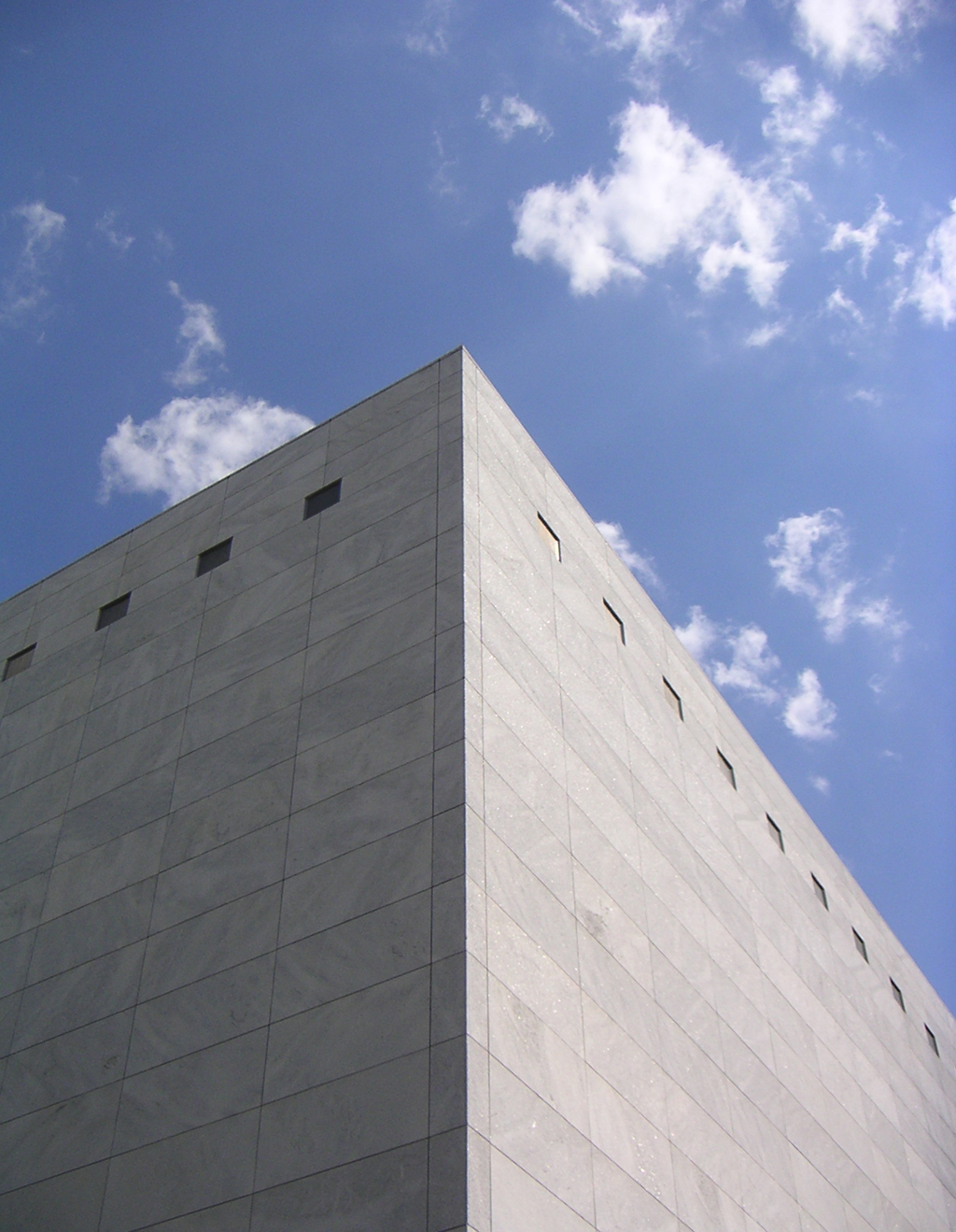 Krastaler Marmor des Hauptspeichers des Kärntner Landesarchivs, fotografiert von Benutzer:Binter first uploaded on de-WP: 22:08, 5. Aug 2005 Benutzer:Binter